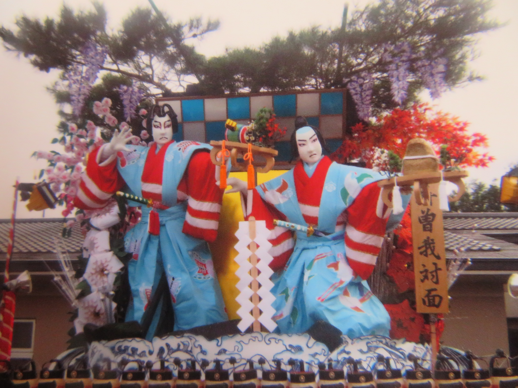 葛巻町・下町組山車(盛岡三番組制作)